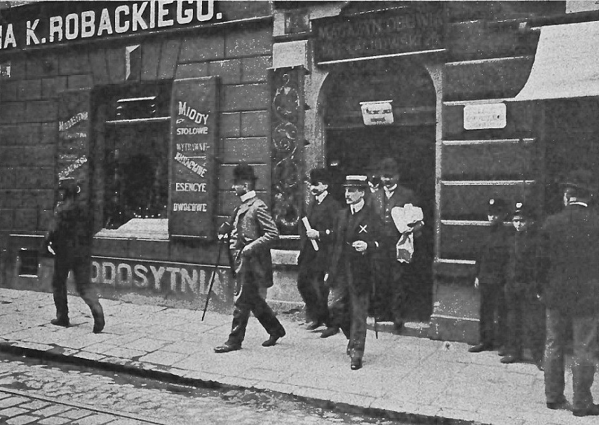 Komisja śledcza przed domem zmarłego dr. Włodzimierza Lewickiego przy ul. Sławkowskiej 28.